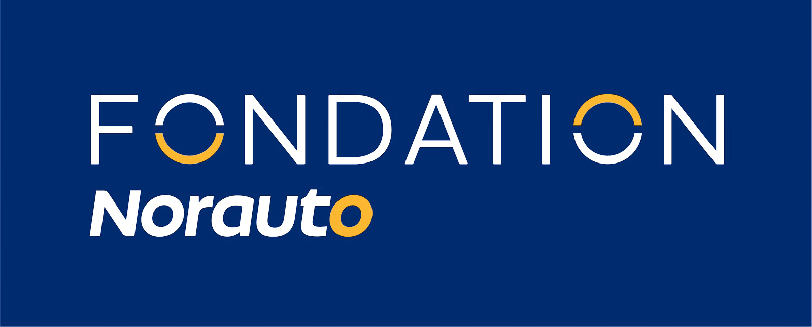 marchio Logo Norauto Fondation